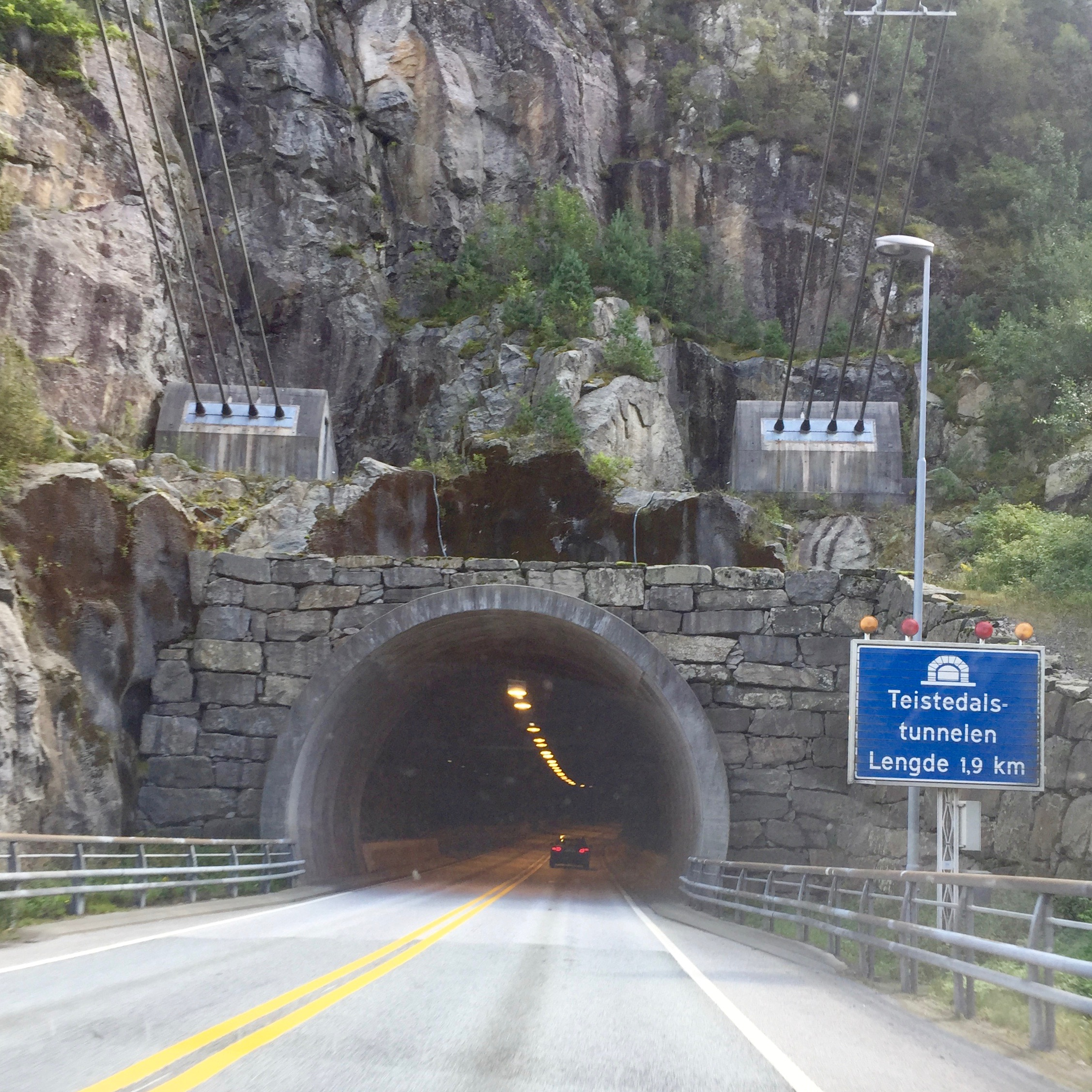 Teistedalstunnel, Vest-Agder, Norwegen